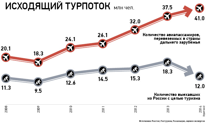 Количество авиапассажиров, перевезённых из России в страны дальнего зарубежья, и количество выехавших из России с целью туризма (2008-2014)